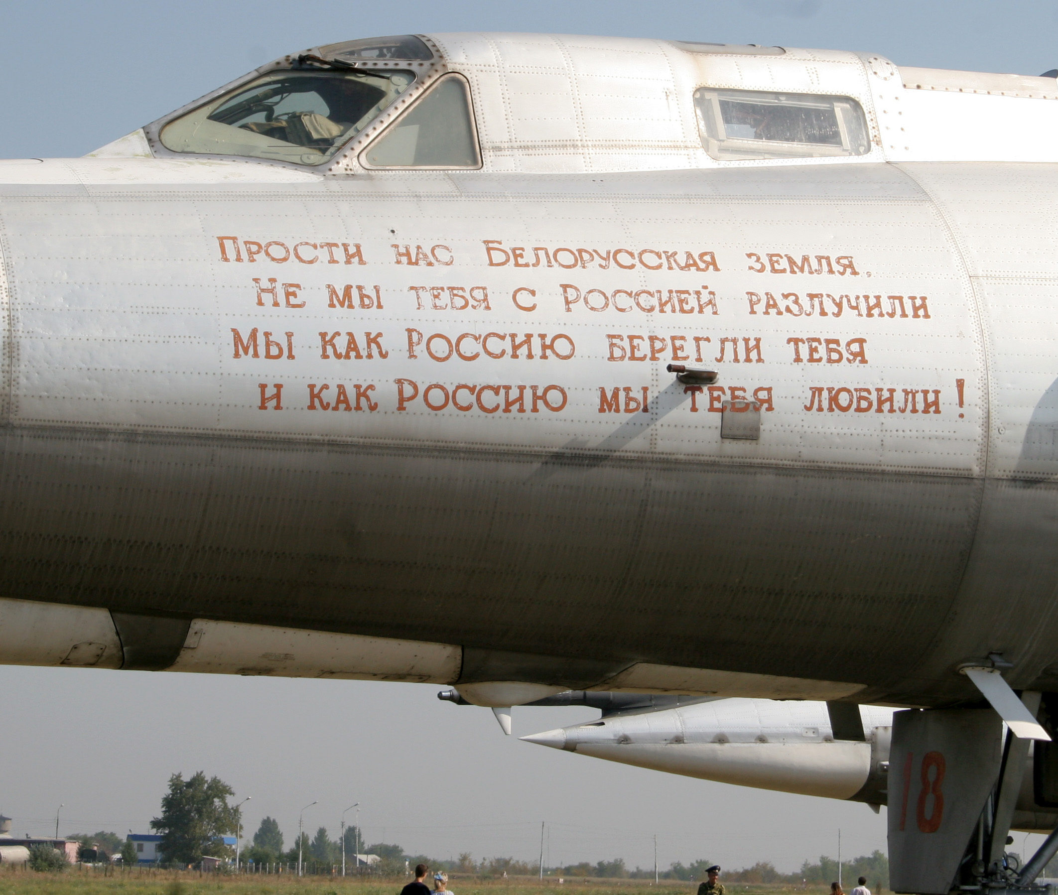 Самолёт Ту-22РДМ бортовой номер 18, надпись на фюзеляже. Экспонат музея дальней авиации на авиабазе Энгельс